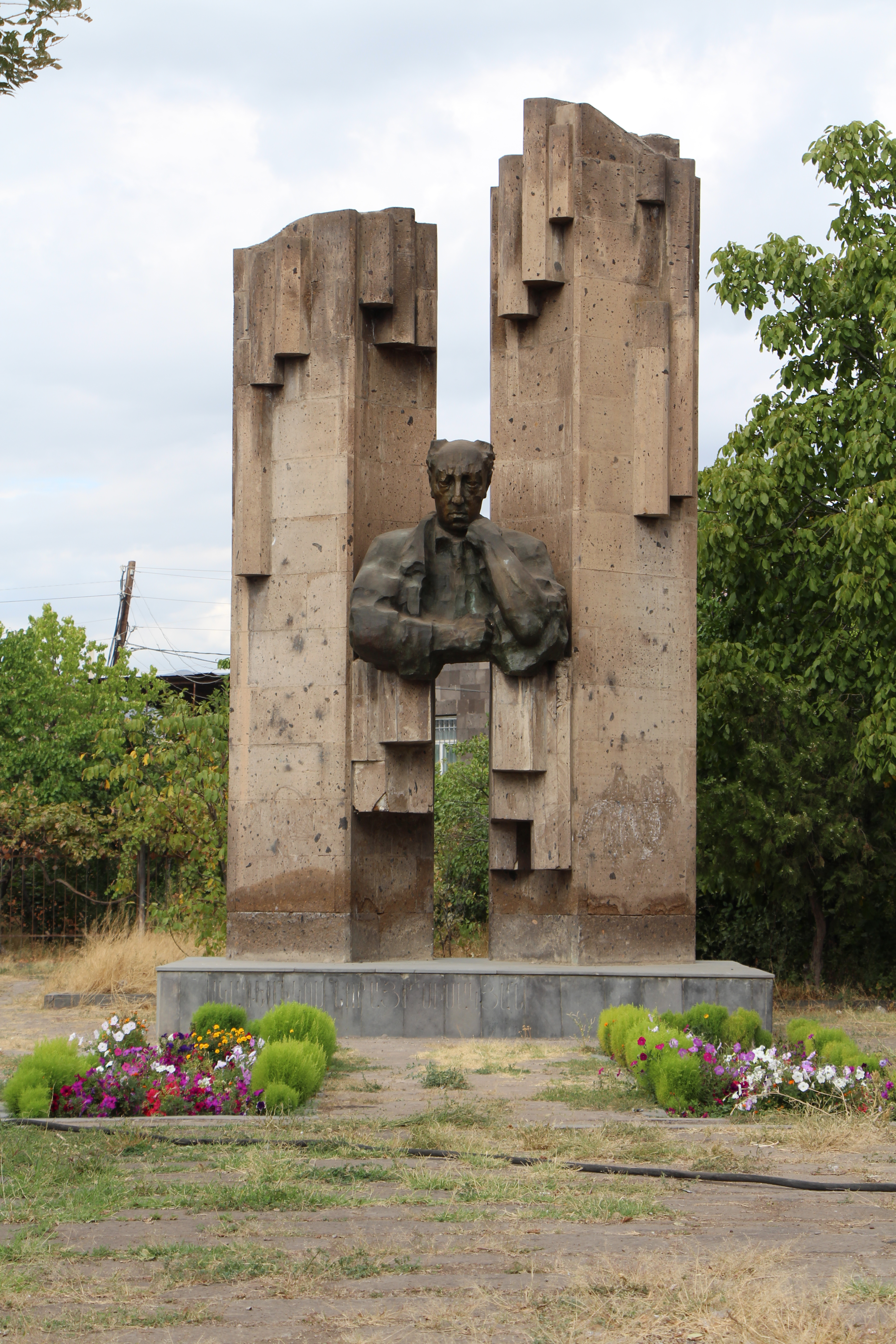 Աշտարակ, Արագածոտնի մարզ, ՀՈՒՇԱՐՁԱՆ ՆՈՐԱՅՐ ՍԻՍԱԿՅԱՆԻ 1987 թ. Ն. Սիսակյան փող. 2.1/26 ճարտ.՝ Գ. Գյուրջյան. քանդ.՝ Ա. Ավագյան 1/26